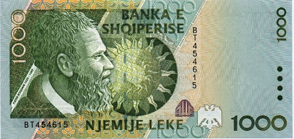 1.000 leke